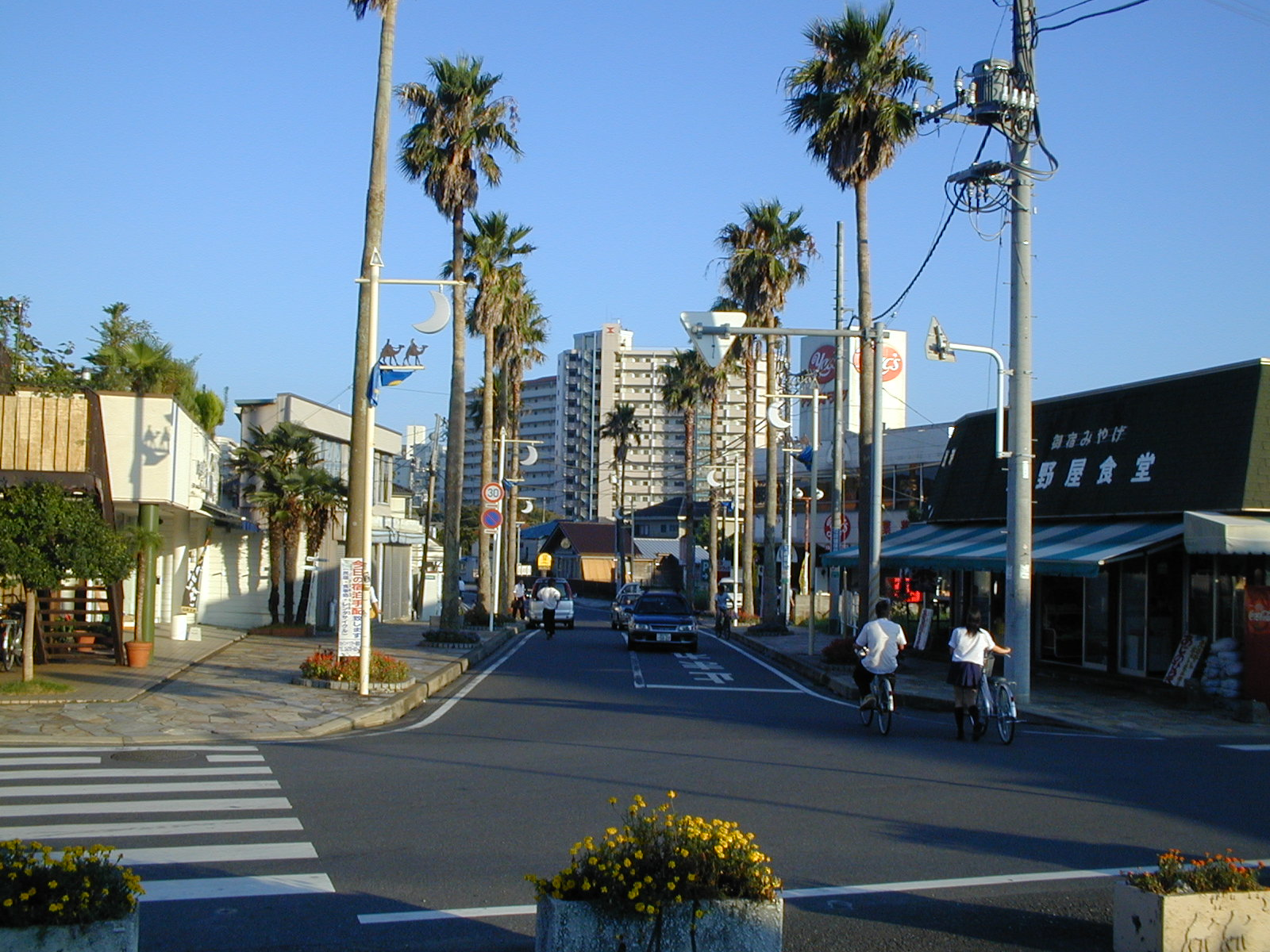 御宿駅前通り(2003/09/09)